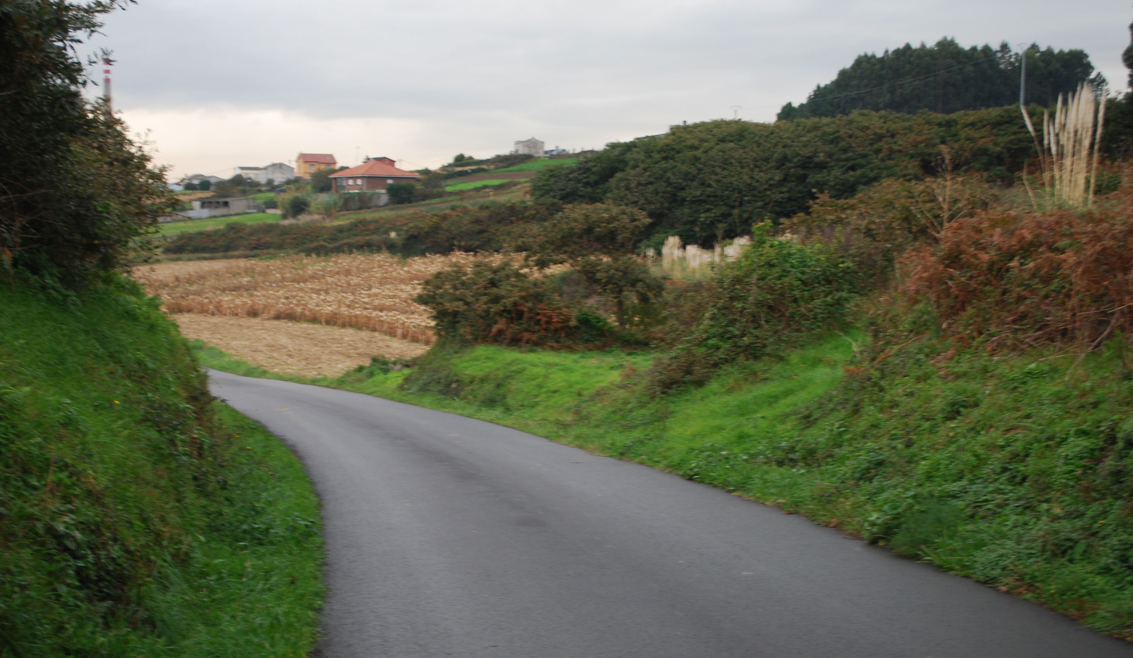 Estrada dentro do castro de rañobre, á dereita parte dos defensas. Arteixo A Coruña Galiza Spain